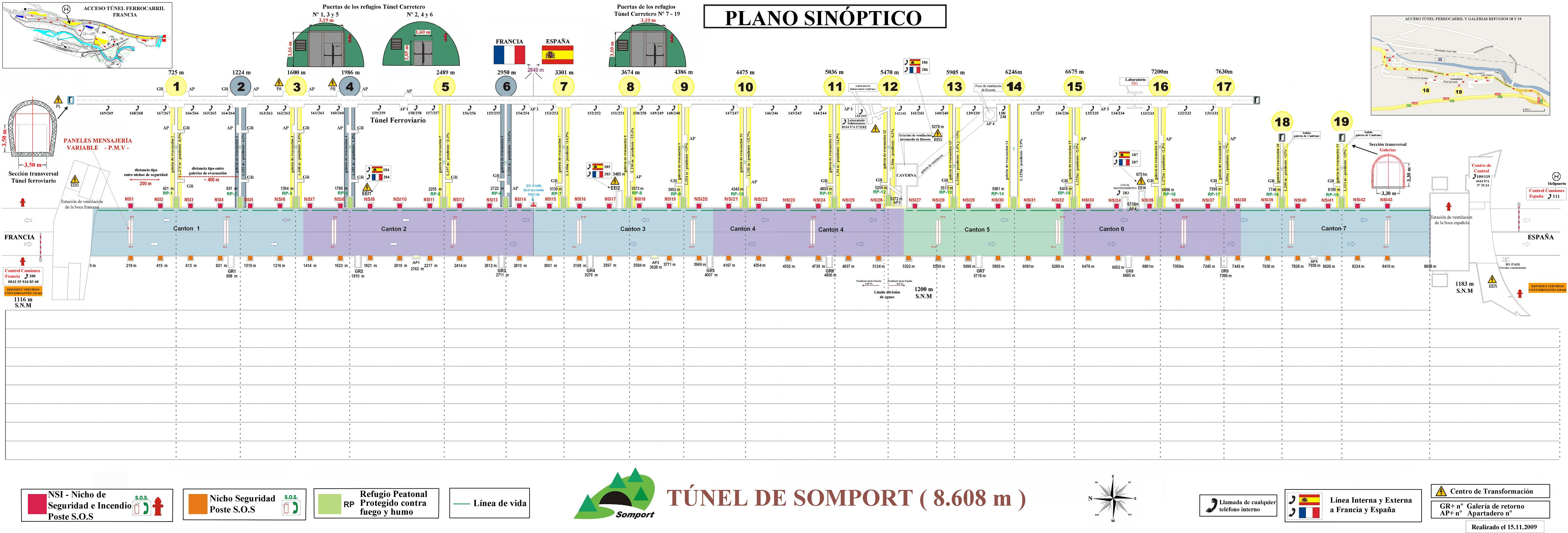 Plan sinoptique du tunnel du Somport, toutes les installations sont répertoriées avec leur appellations techniques ainsi que les distances.